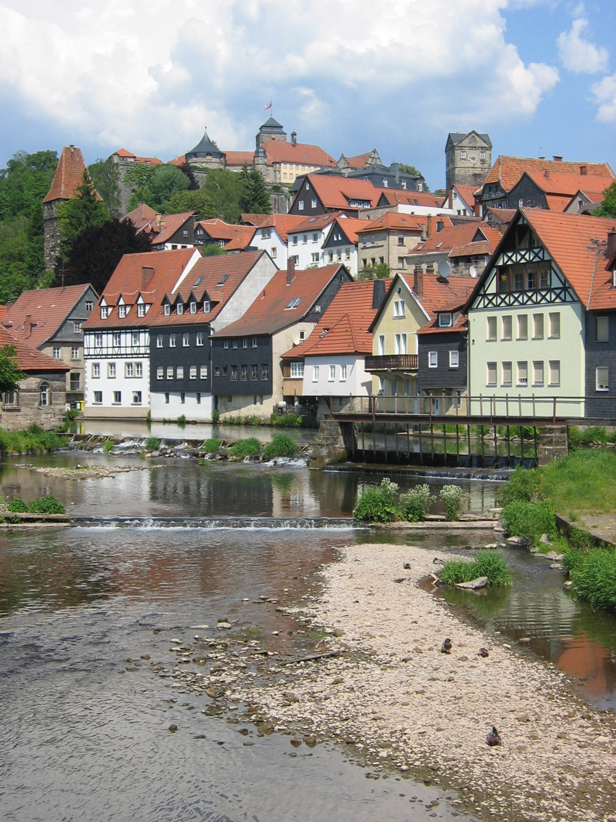 Die Haßlach am Steinwehr in Kronach